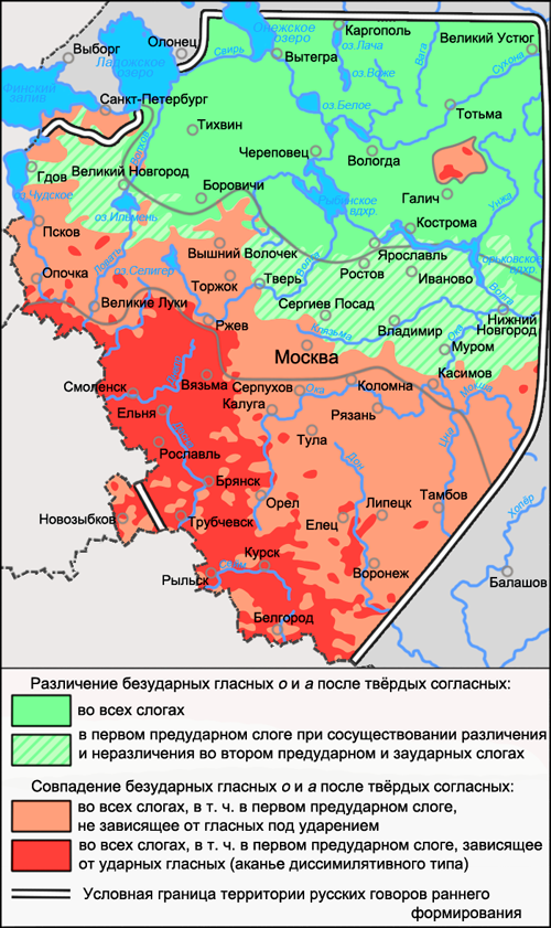 Карта произношения (различения и совпадения) гласных в безударных слогах после твёрдых согласных в русских говорах. Источники: Захарова К. Ф., Орлова В. Г., Сологуб А. И., Строганова Т. Ю. Образование севернорусского наречия и среднерусских говоров / Ответственный редактор В. Г. Орлова. — М.: «Наука», 1970. — С. 149 (Карта 40. Вокализм 2-го предударного и заударных слогов после твёрдых согласных) Диалектологический атлас русского языка. Центр Европейской части СССР. Выпуск I: Фонетика / Под ред. Р. И. Аванесова и С. В. Бромлей. — М.: «Наука», 1986. — Карта 1. Различение или совпадение гласных на месте о и а в первом предударном слоге после твёрдых согласных. Бромлей С. В., Булатова Л. Н., Гецова О. Г. и др. Русская диалектология / Под ред. Л. Л. Касаткина. — М.: Издательский дом «Академия», 2005. — С. 38 (Карта 1. Оканье и аканье) — ISBN 5-7695-2007-8 Букринская И. А., Кармакова О. Е. и др. Карта 12. Различие или совпадение о и а в предударных слогах после твёрдых согласных (оканье и аканье). Язык русской деревни. Диалектологический атлас. Справочно-информационный портал Грамота.ру